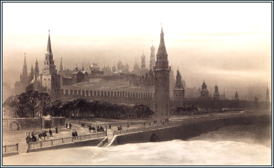 Бартелеми Ловернь, литография с изображением московского Кремля.